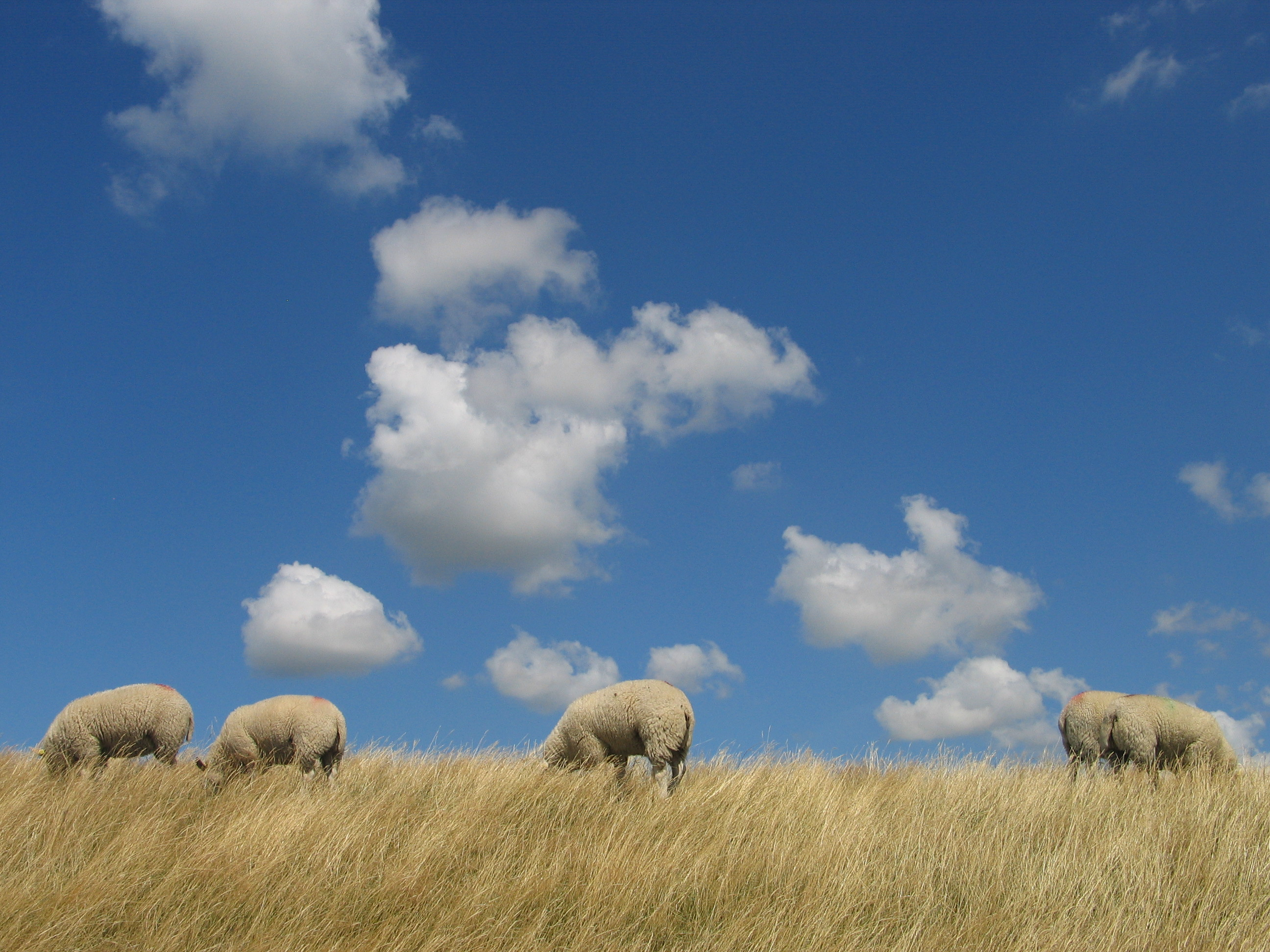 Texelschafe auf einem Damm nahe Cocksdorp